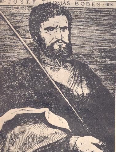 Retrato grabado de José Tomás Boves